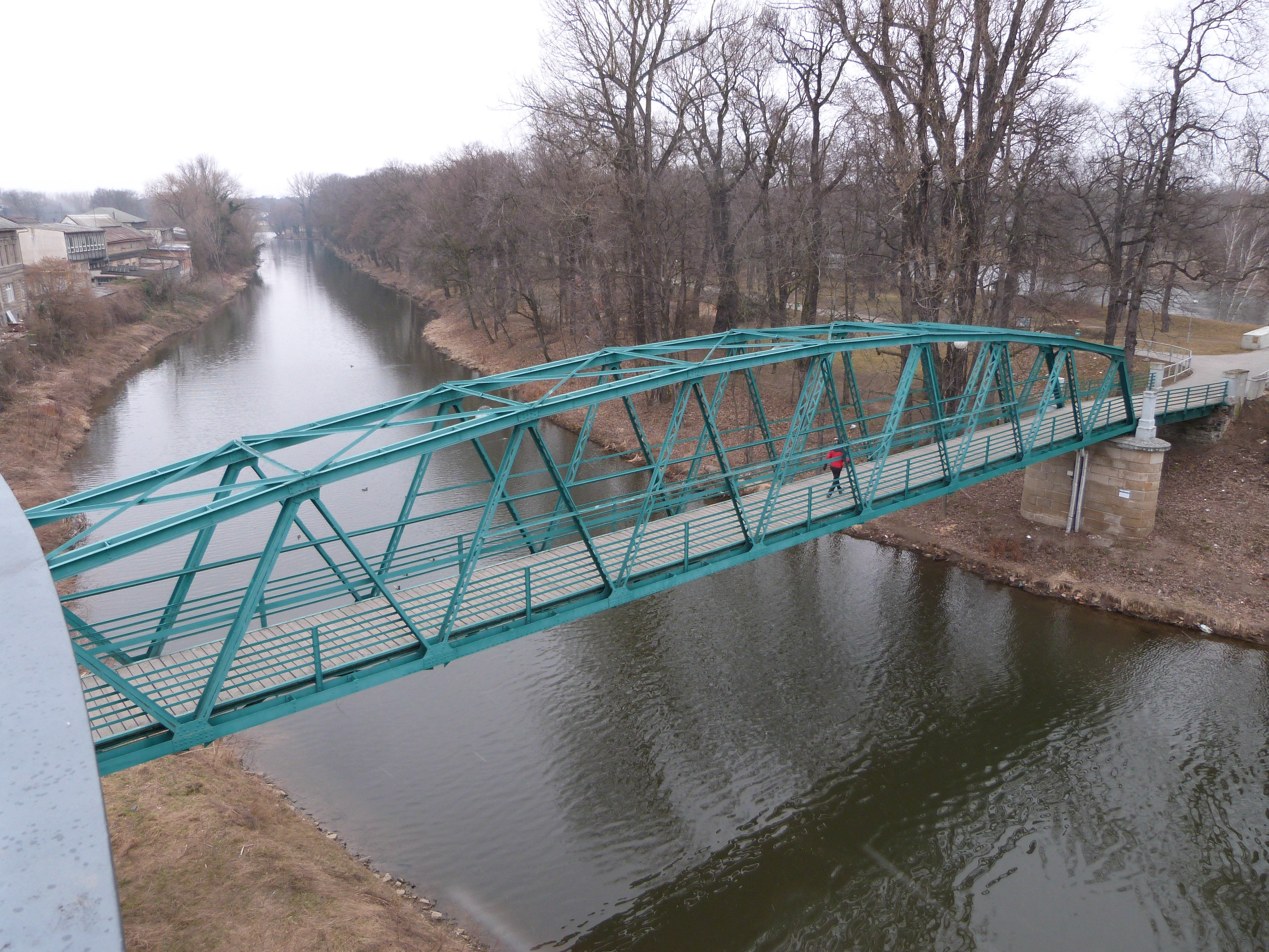 Stará lávka na Kmochův ostrov v Kolíně